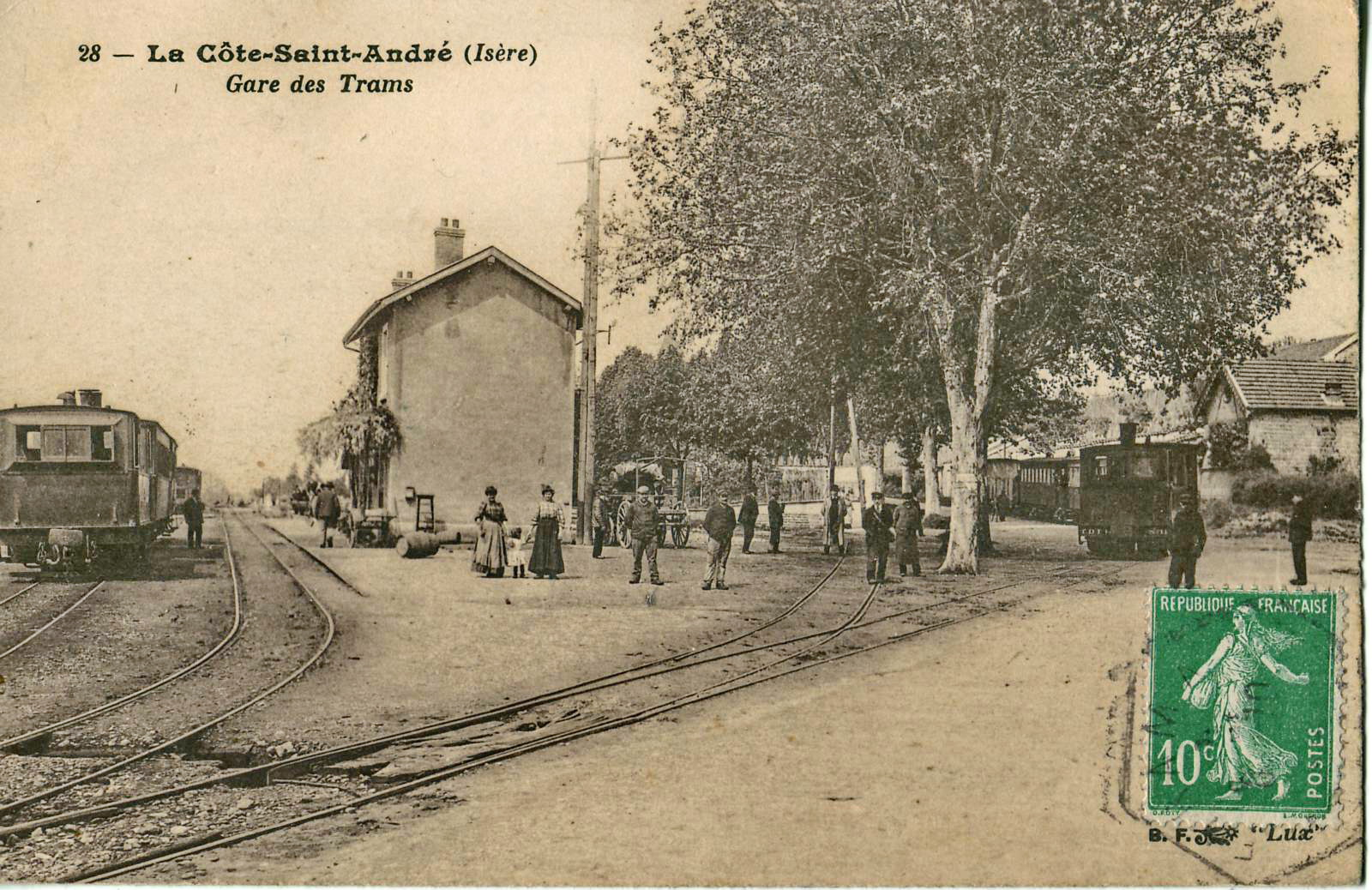 Carte postale ancienne éditée par BF à Paris, série "Lux", n°28 : LA CÔTE-SAINT-ANDRÉ - La Gare des trams